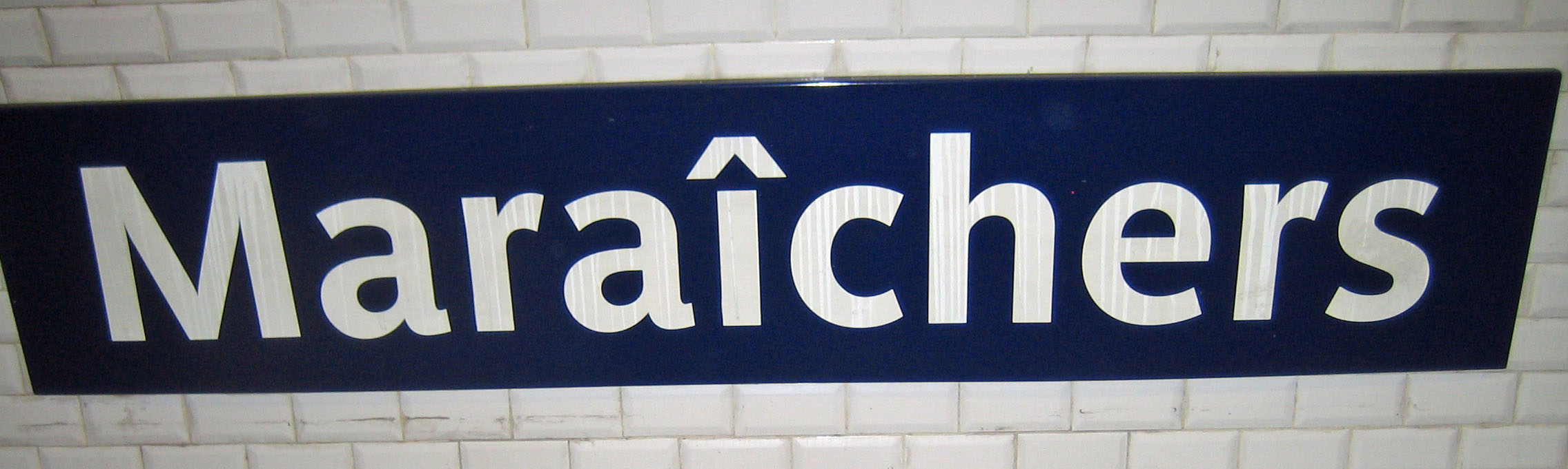 Plaque indicative de la station « Maraîchers » de la ligne 9 du métro de Paris.